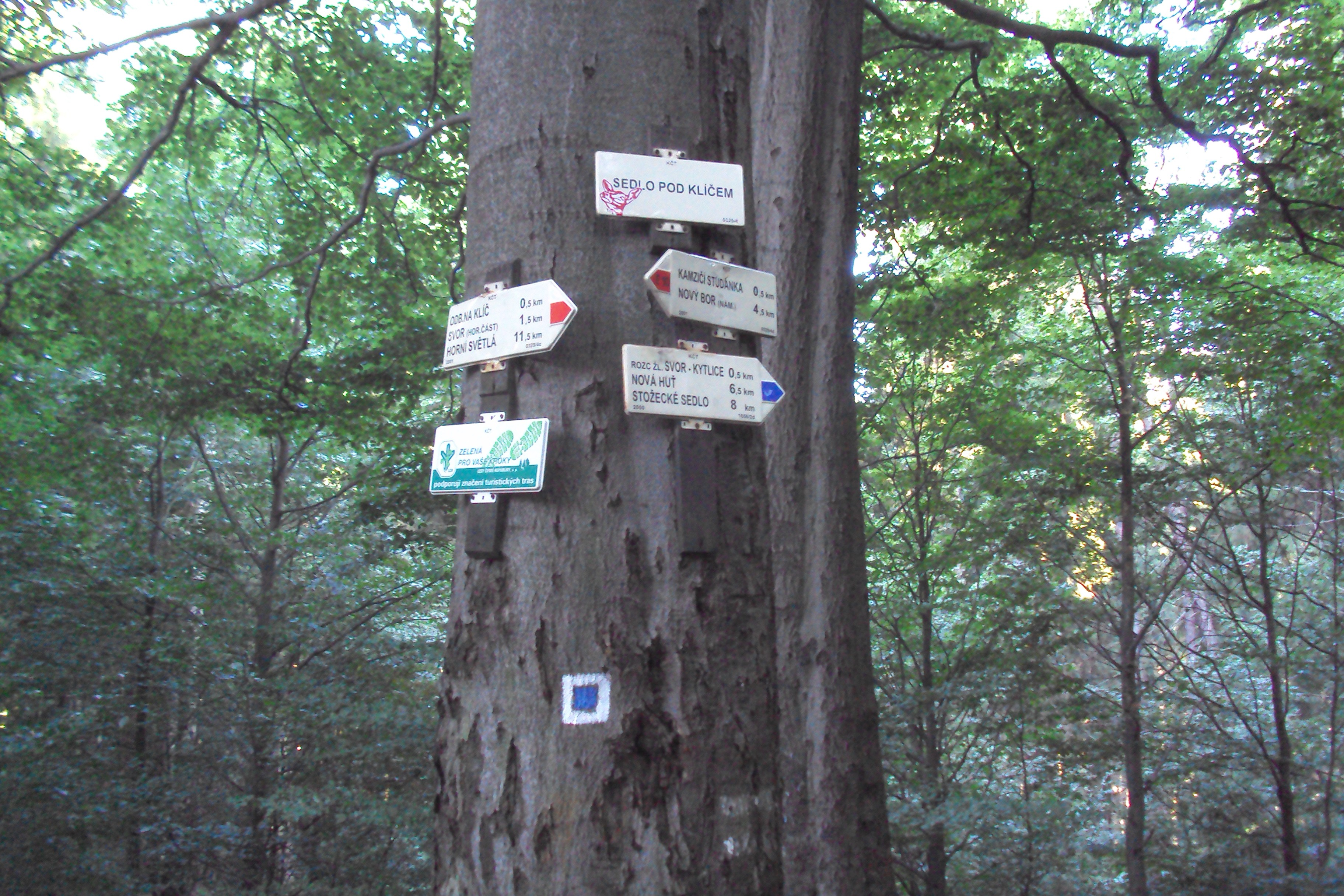 Rozcestník v sedle pod Klíčem, blízko pod vrcholem